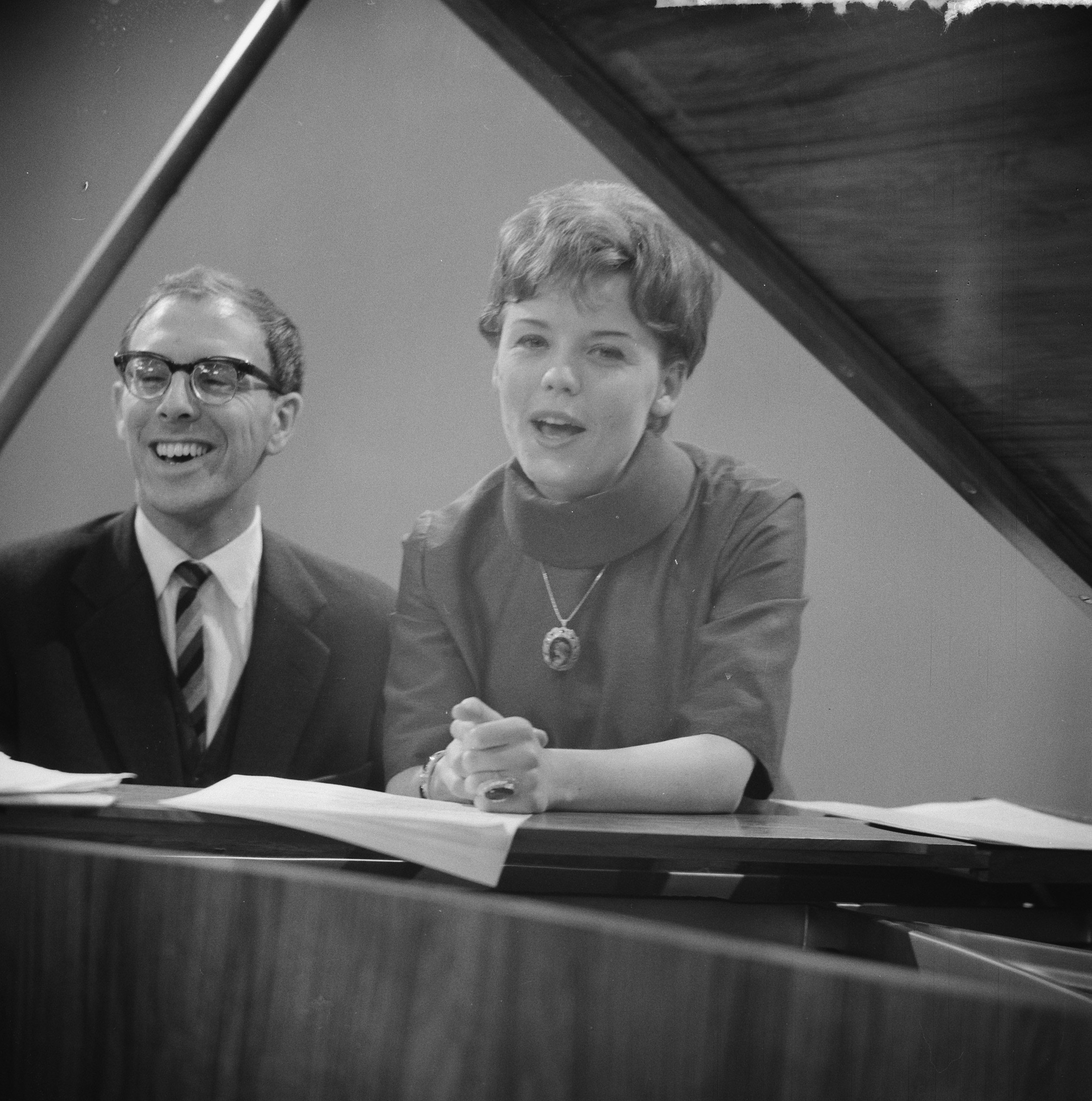 Collectie / Archief : Fotocollectie Anefo Reportage / Serie : Eurovisie Songfestival 1961 Beschrijving : Greetje Kauffeld zingt "Wat een dag" het Nederlandse liedje voor het Eurovisie Songfestival 1961. Dick Schallies en Greetje Kauffeld Datum : 15 februari 1961 Trefwoorden : artiesten, componisten, muziek, songfestivals Persoonsnaam : Kauffeld, Greetje, Schallies, Dick Fotograaf : Nijs, Jac. de / Anefo Auteursrechthebbende : Nationaal Archief Materiaalsoort : Negatief (zwart/wit) Nummer archiefinventaris : bekijk toegang 2.24.01.03 Bestanddeelnummer : 912-1036